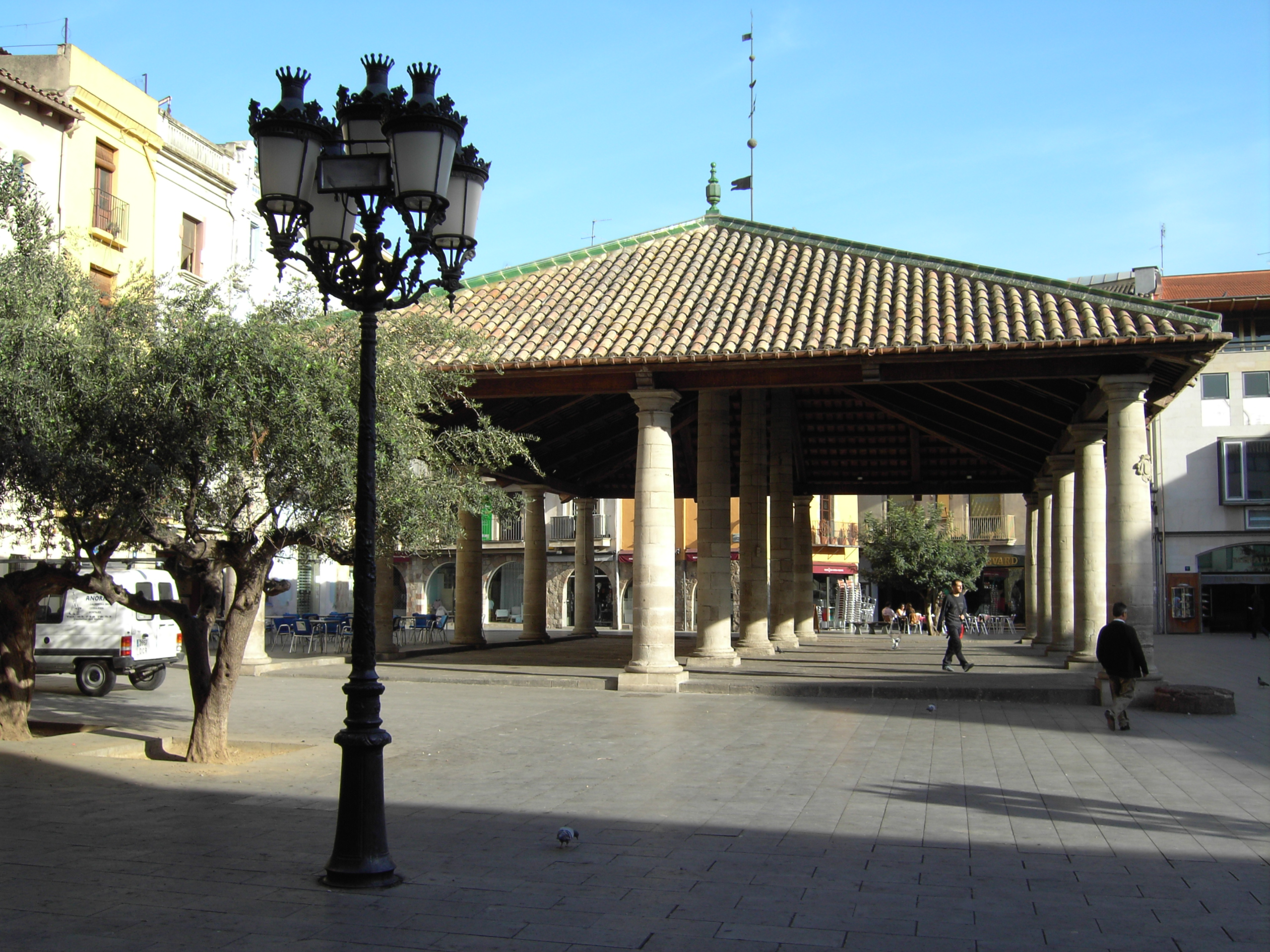 La Porxada in Granollers, Catalonia